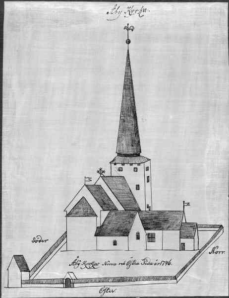 Teckning av gamla kyrkan mot öster 1746. Efter Frigelius. Kategori: (01) ExteriörerTeckning av gamla kyrkan mot öster 1746. Efter Frigelius.